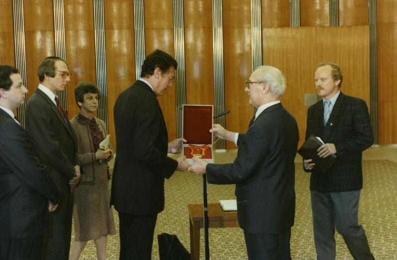 ADN-ZB/Link/17.10.88/Berlin: Bronfman-Besuch Der Generalsekretär des ZK der SED und Vorsitzende des Staatsrates der DDR, Erich Honecker, verlieh dem Präsidenten des Jüdischen Weltkongresses, Edgar Miles Bronfman, im Amtssitz des Staatsrates den Großen Stern der Völkerfreundschaft. Links: Rabbiner Prof. Dr. Israel Singer, Generalsekretär des Jüdischen Weltkongresses.